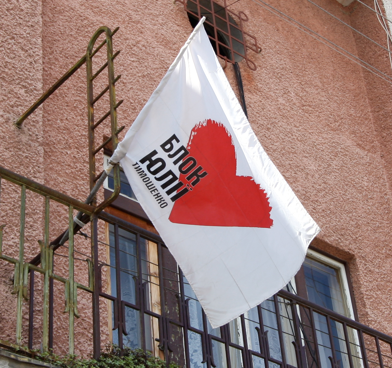 Блок Юлії Тимошенко, Прапор